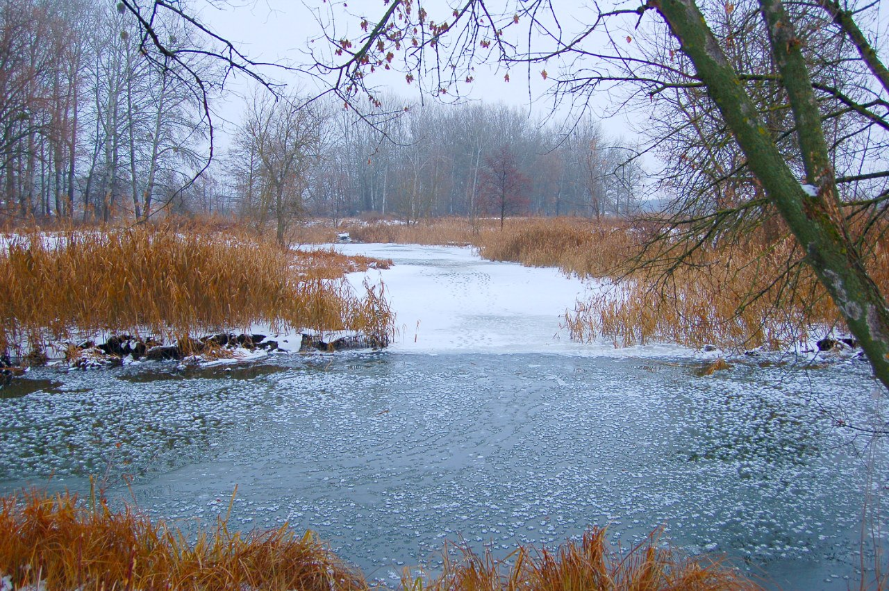 «Слобожанський», Краснокутський район